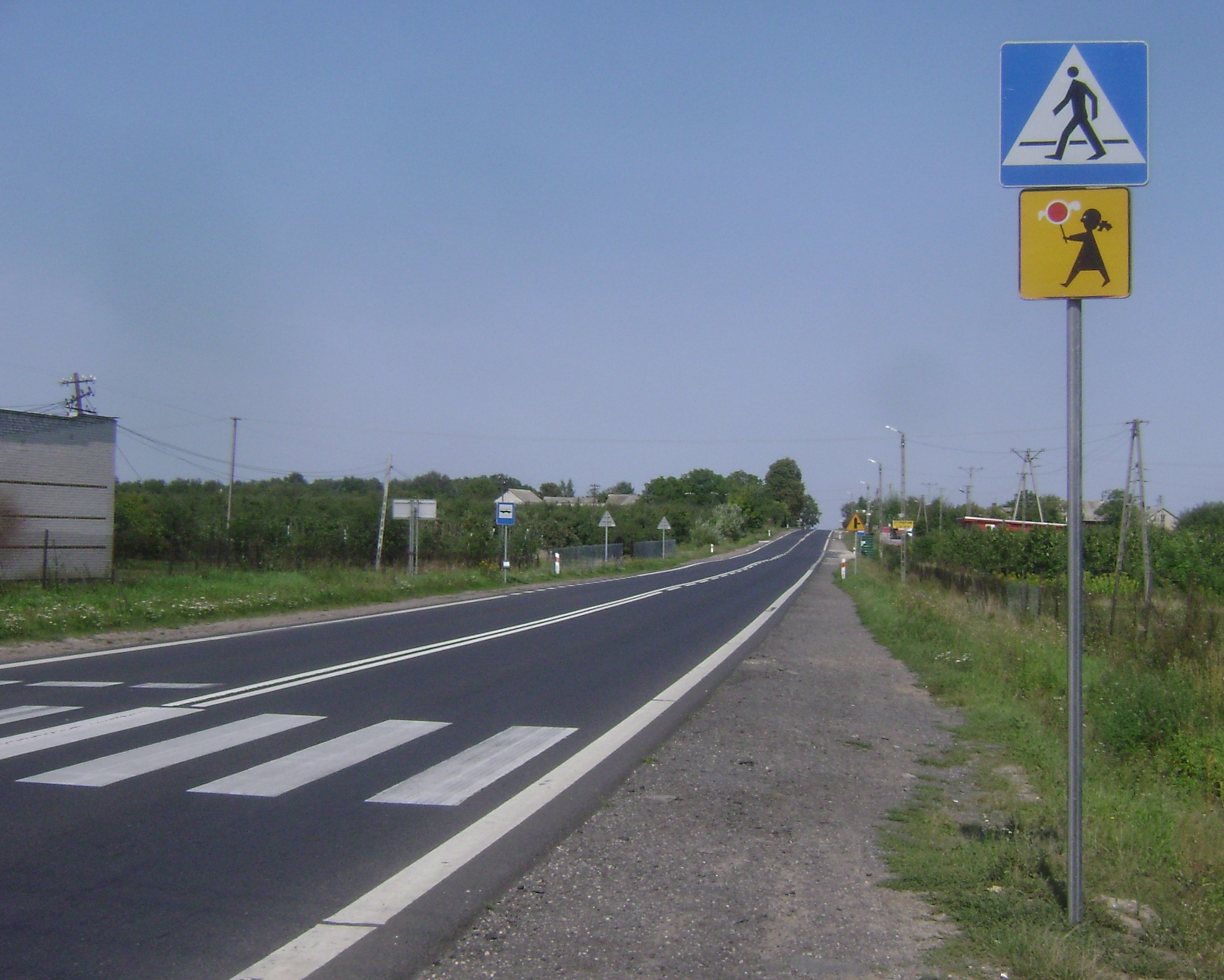 Coniew